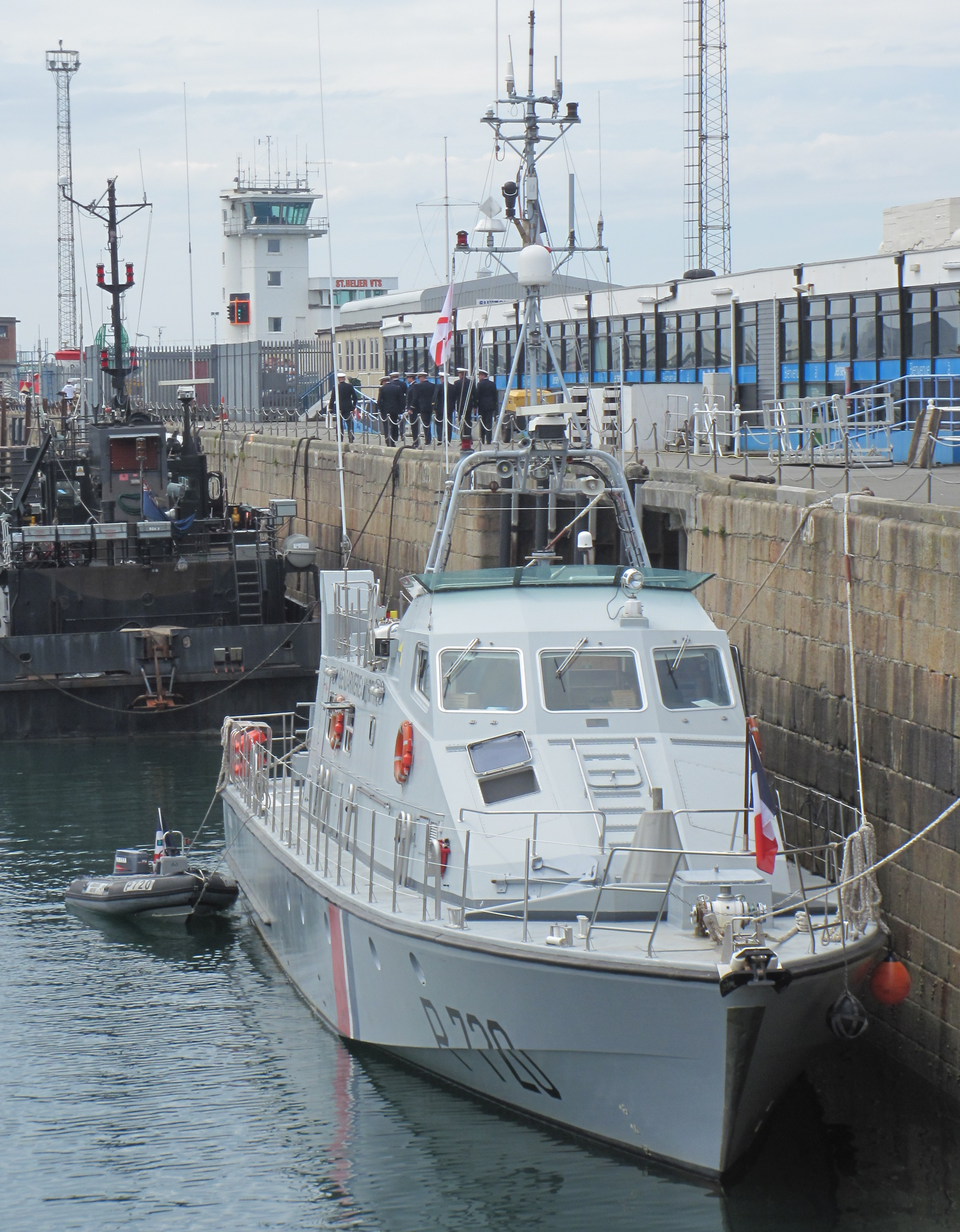 Un patrouilleur côtier de 32 mètres (Géranium P720) de la Gendarmerie maritime en visite à Saint-Hélier, Jersey